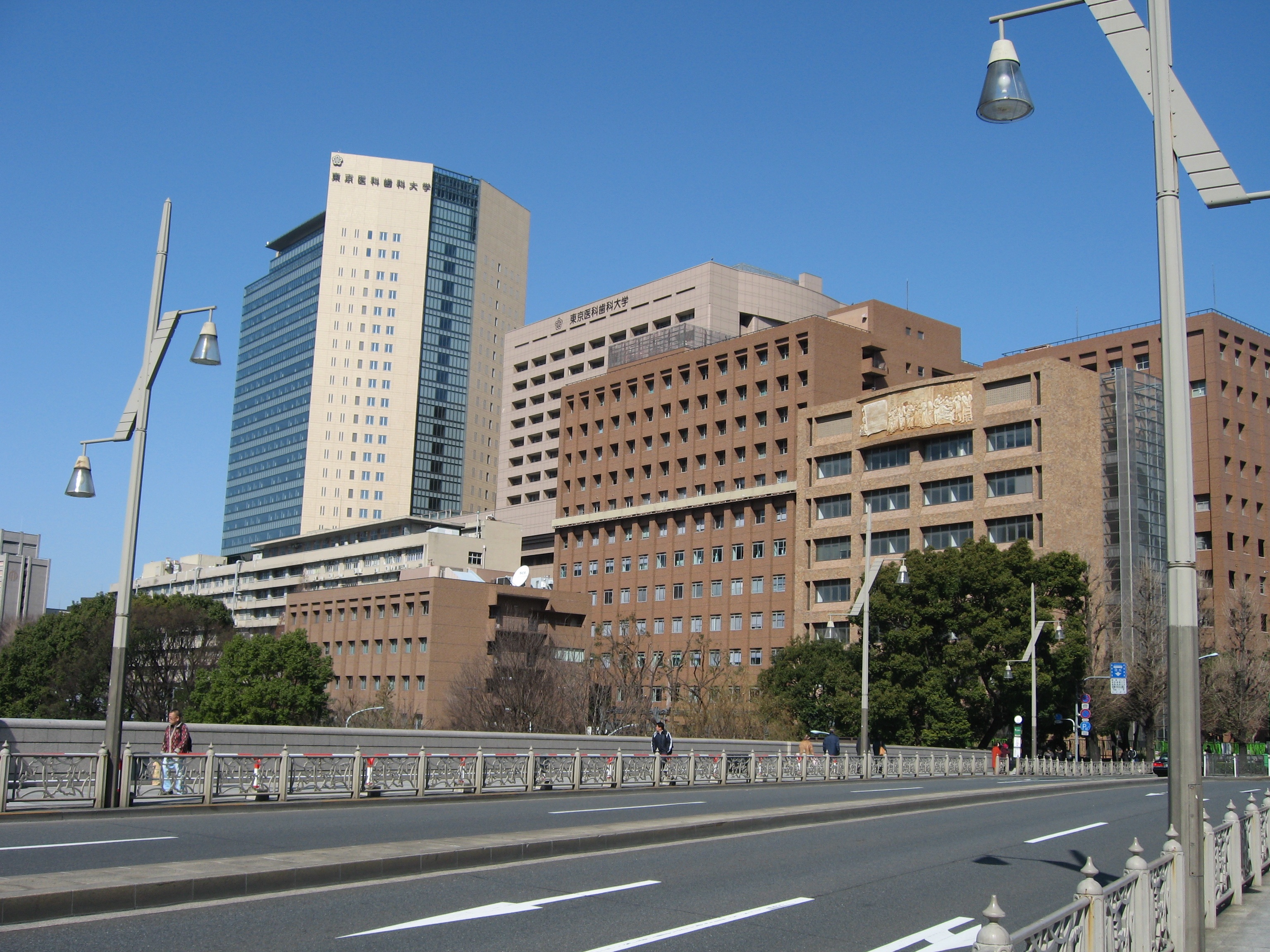 投稿者自身による撮影